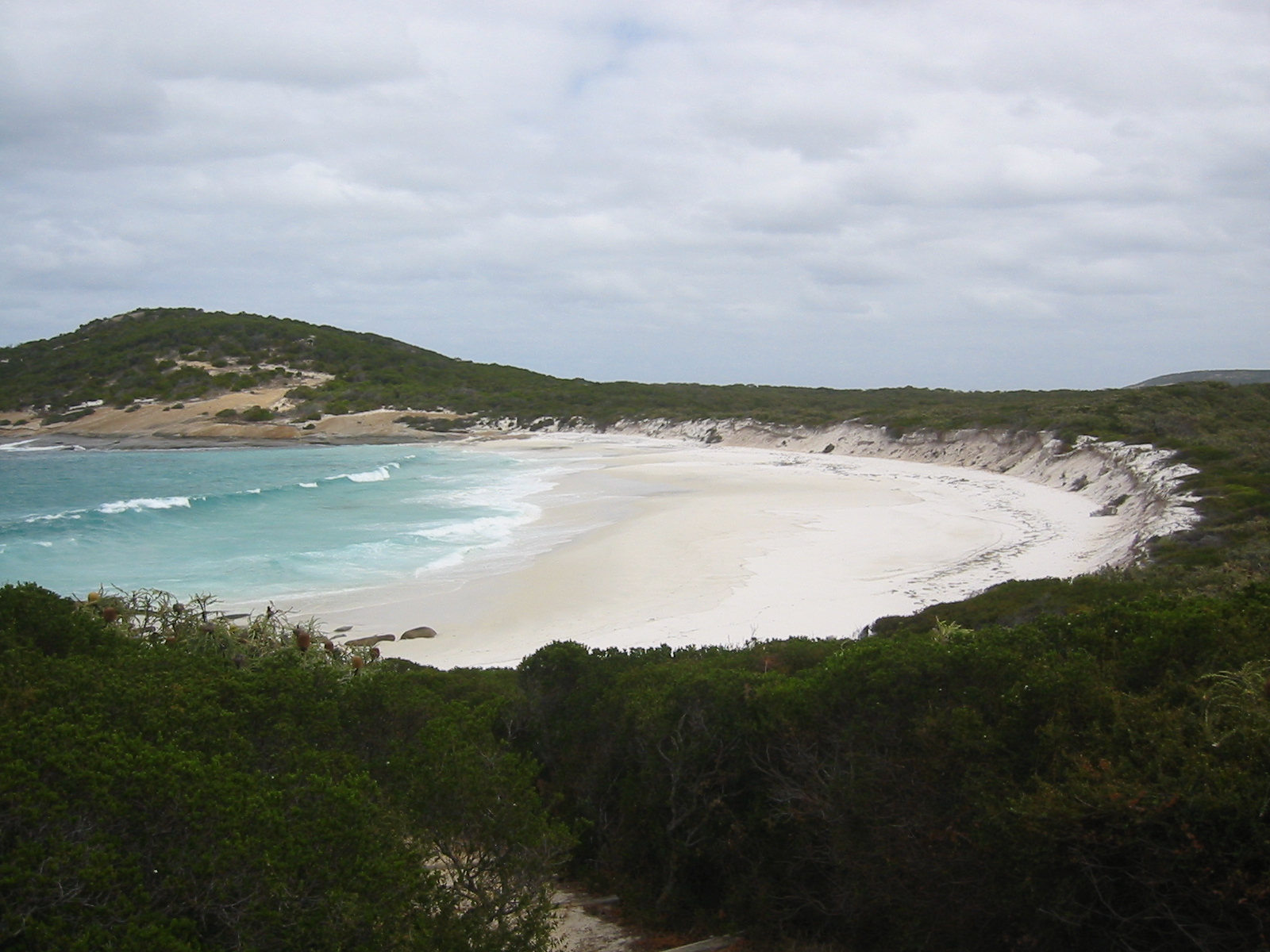 kleine Bucht nahe Tagon Point, Cape Arid NP